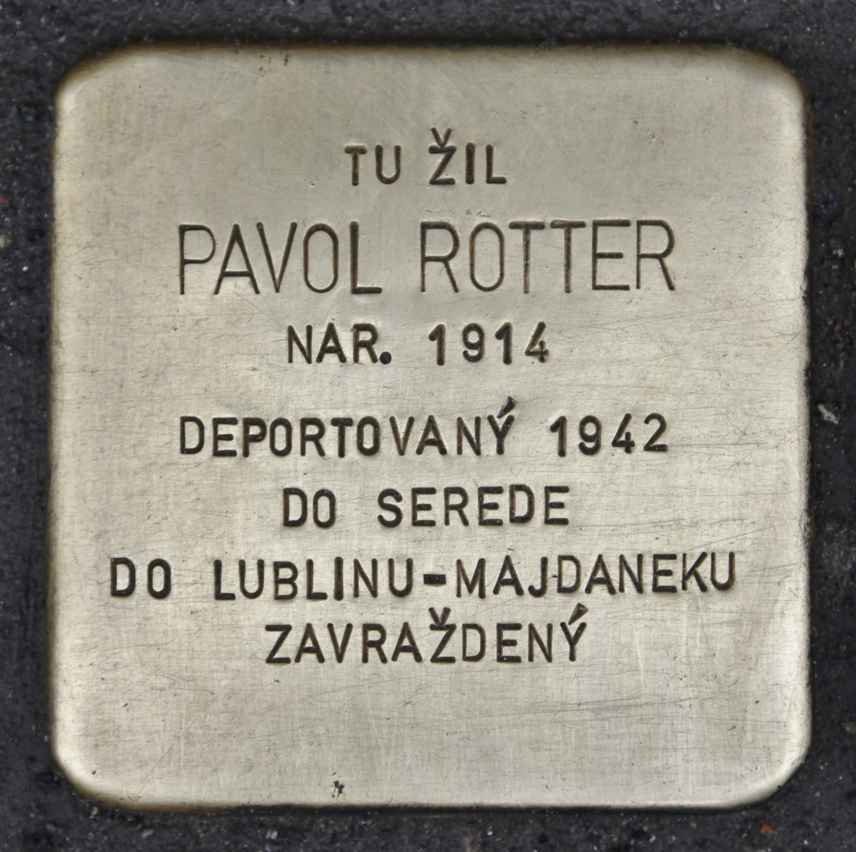 Stolperstein für Pavol Rotter